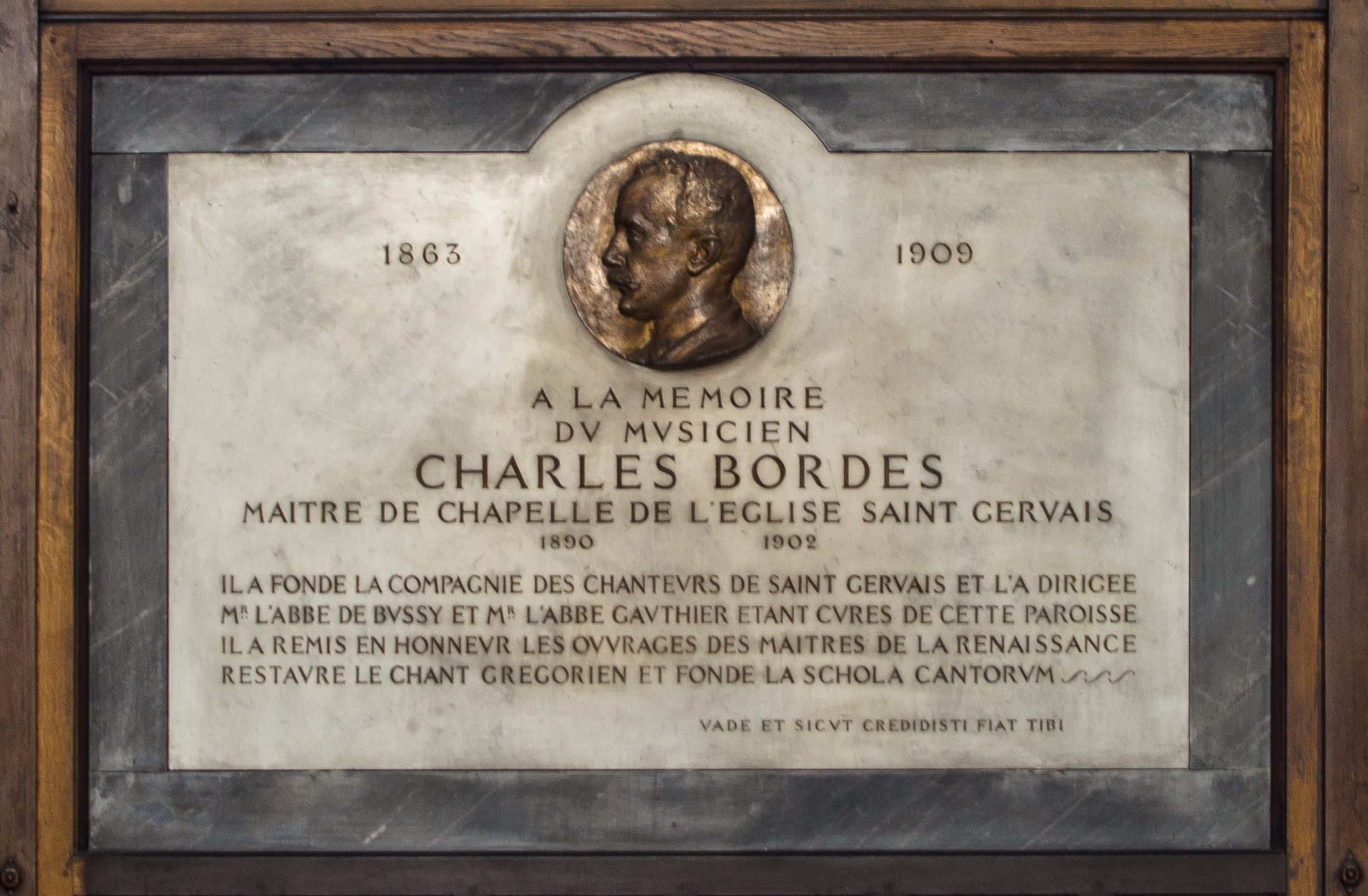 Plaque commémorative dédiée à Charles Bordes en l'église Saint Gervais de Paris